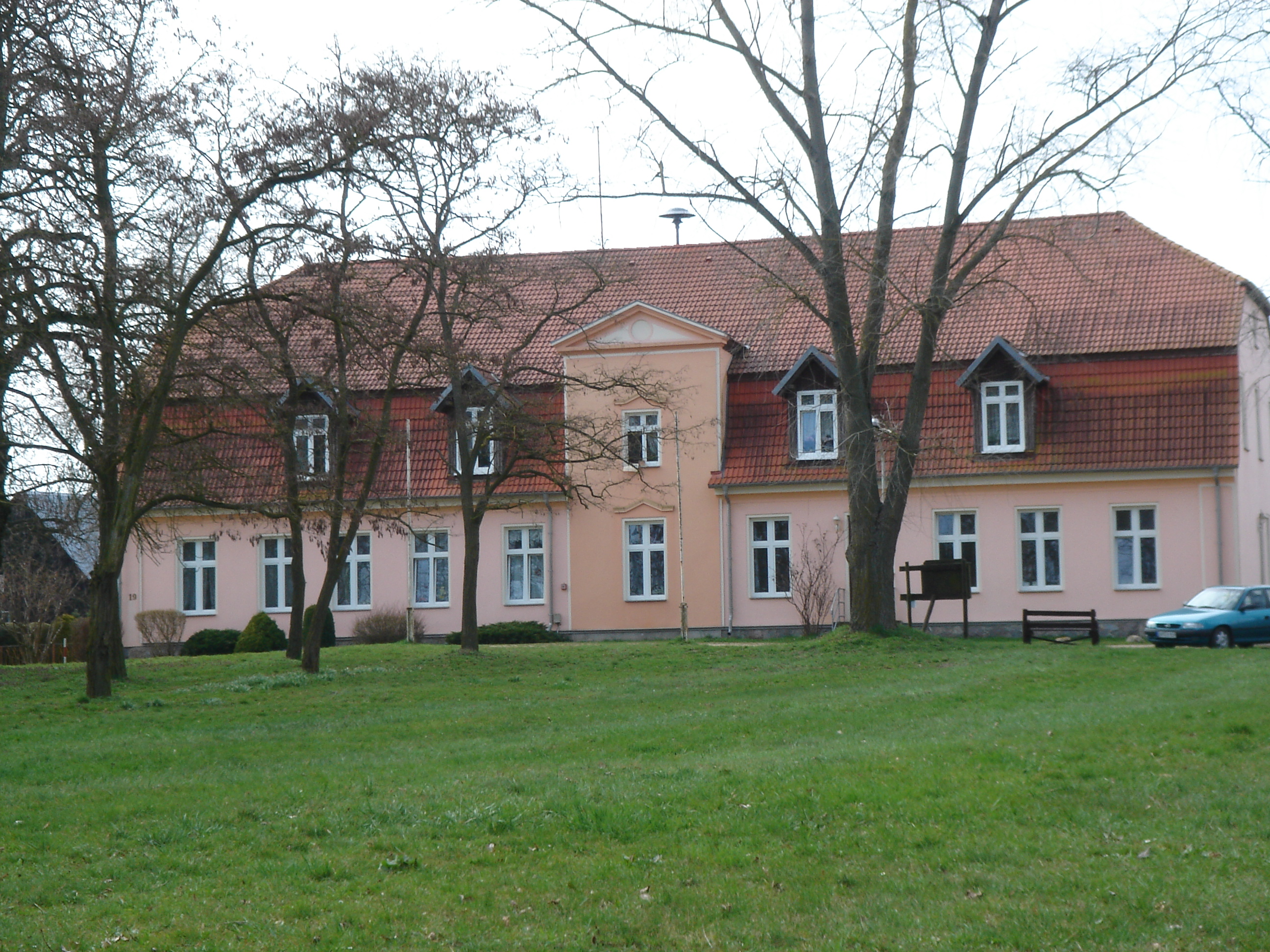 Der ehemalige Gutshof von Daugzin zu Ostern 2009